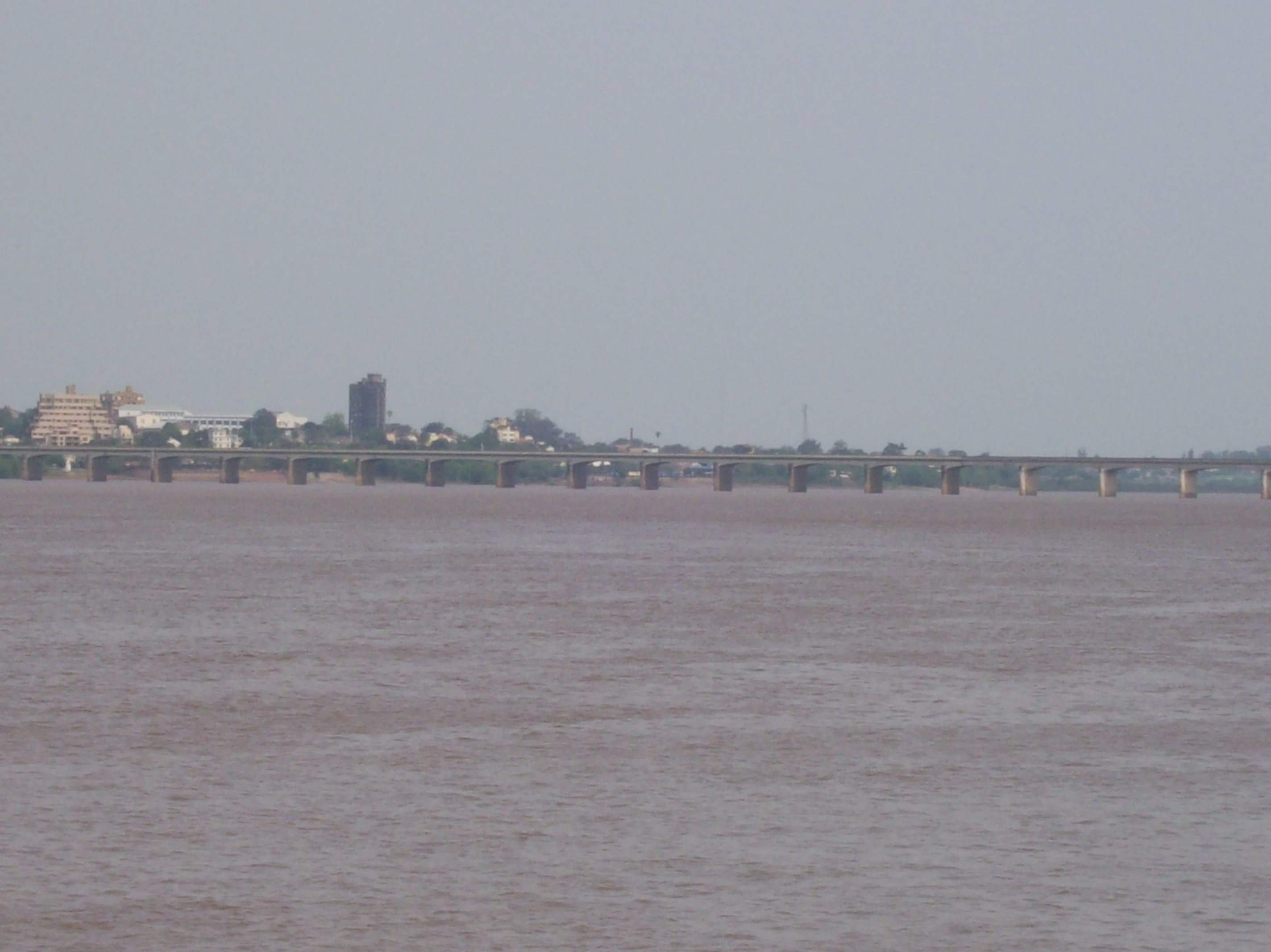 Puente Internacional que une Paso de los Libres, Argentina y Uruguayana, Brasil. Al fondo, ciudad de Uruguayana.